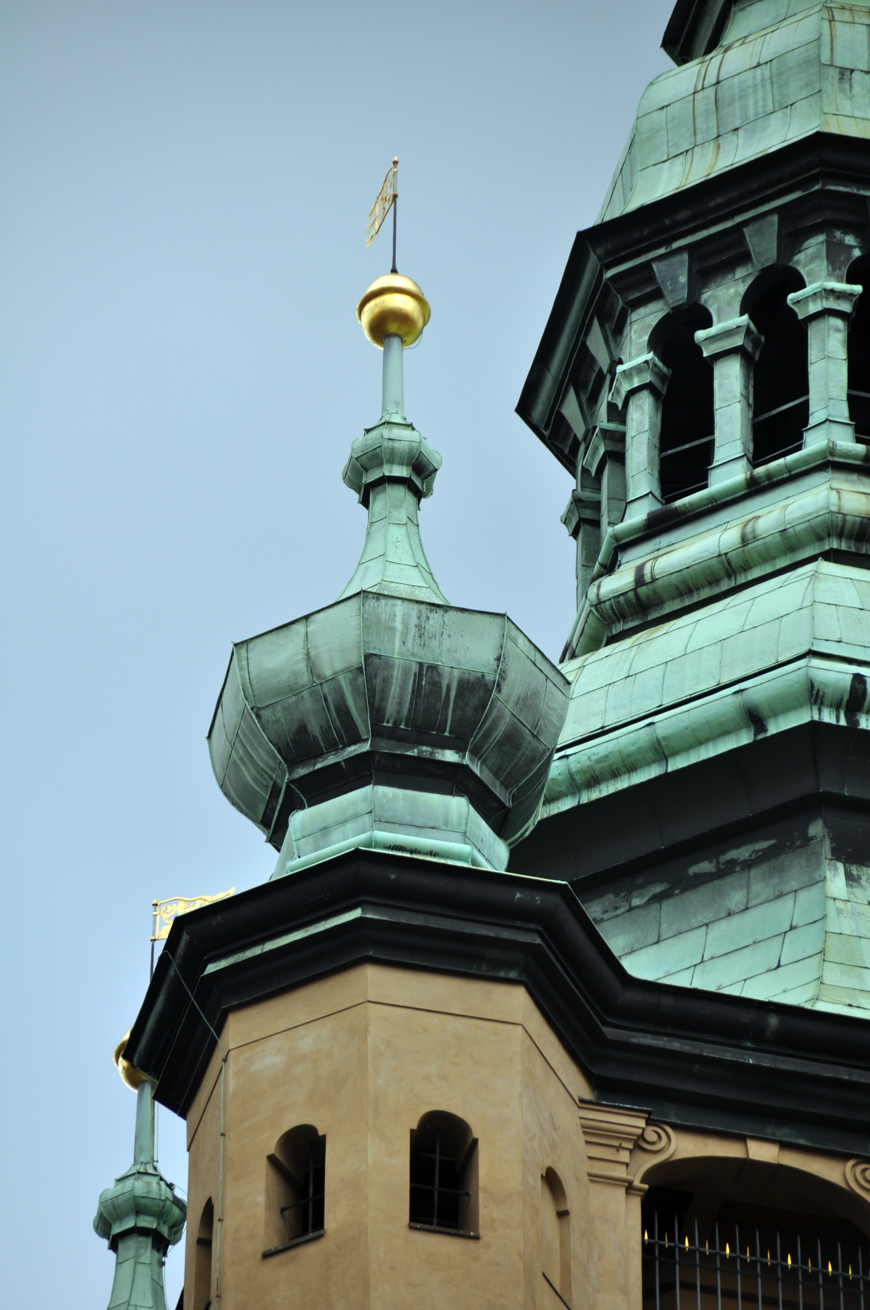 Prag